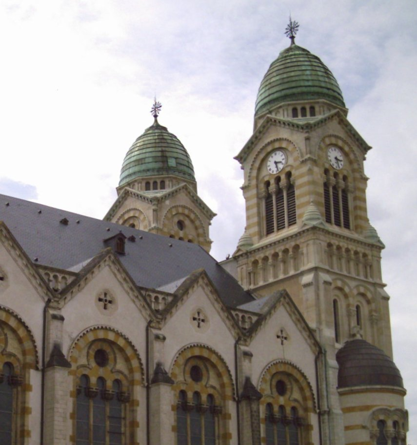 Basilique du Sacré-Coeur de Nancy